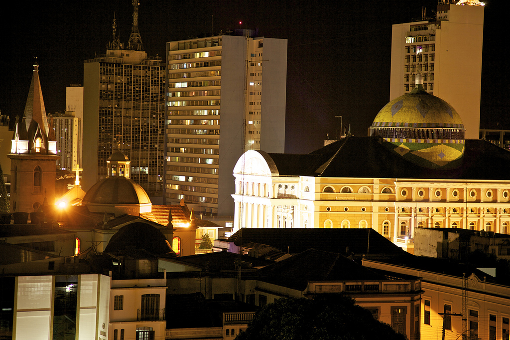 Centro de Manaus,Amazonas.